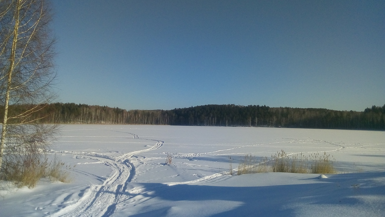 Белое озеро зимой (Челябинская область, Кыштымский городской округ).